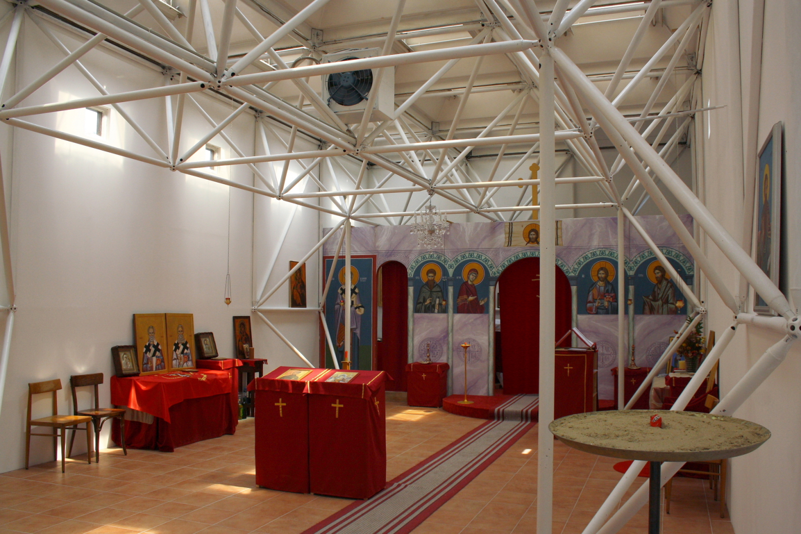 Die Innenansicht der Kirche in der Siemensstraße 26, Wien.